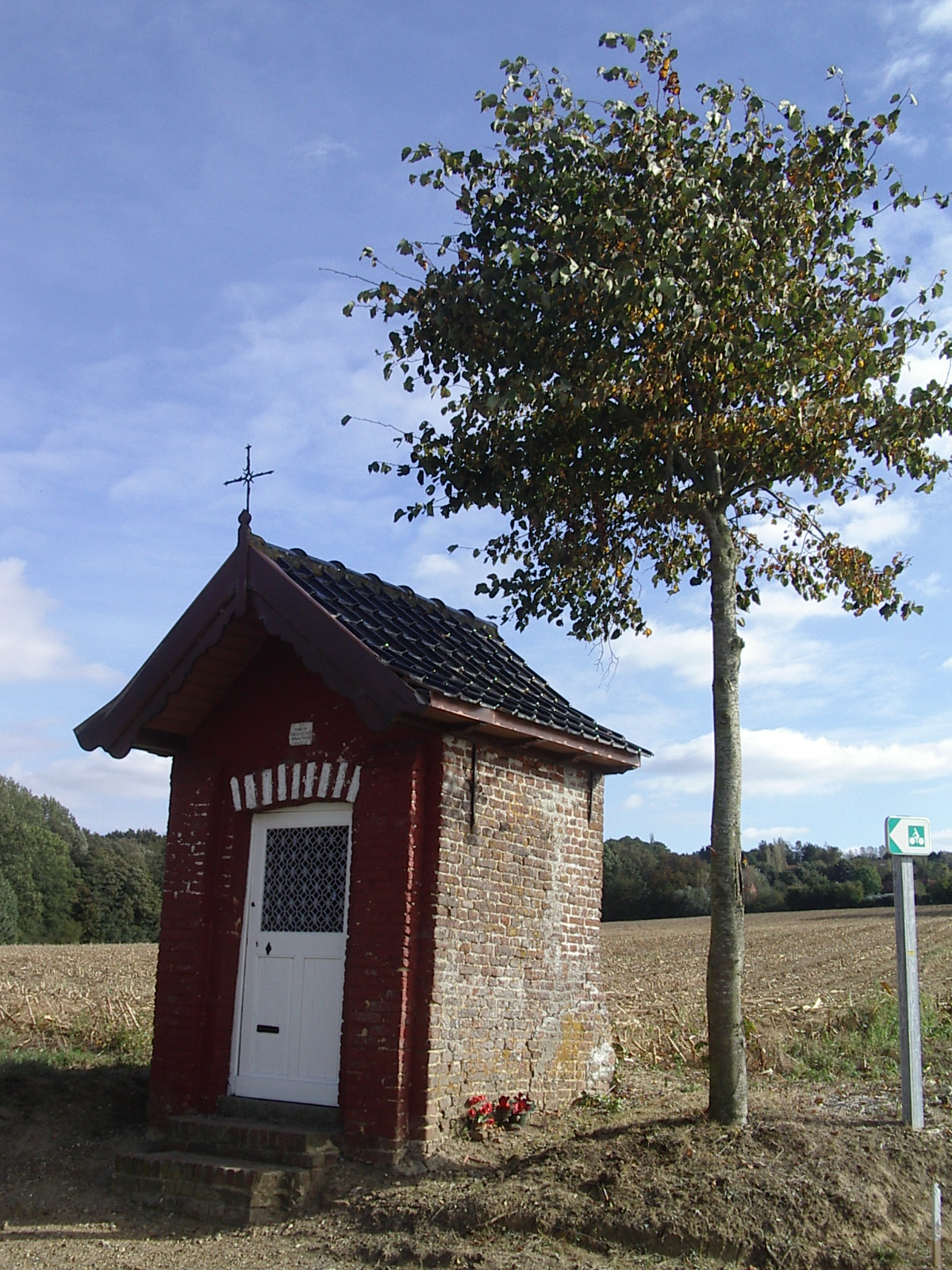 Chapelle Marie-consolation-de-la-peur à Boeschepe (France, Nord)